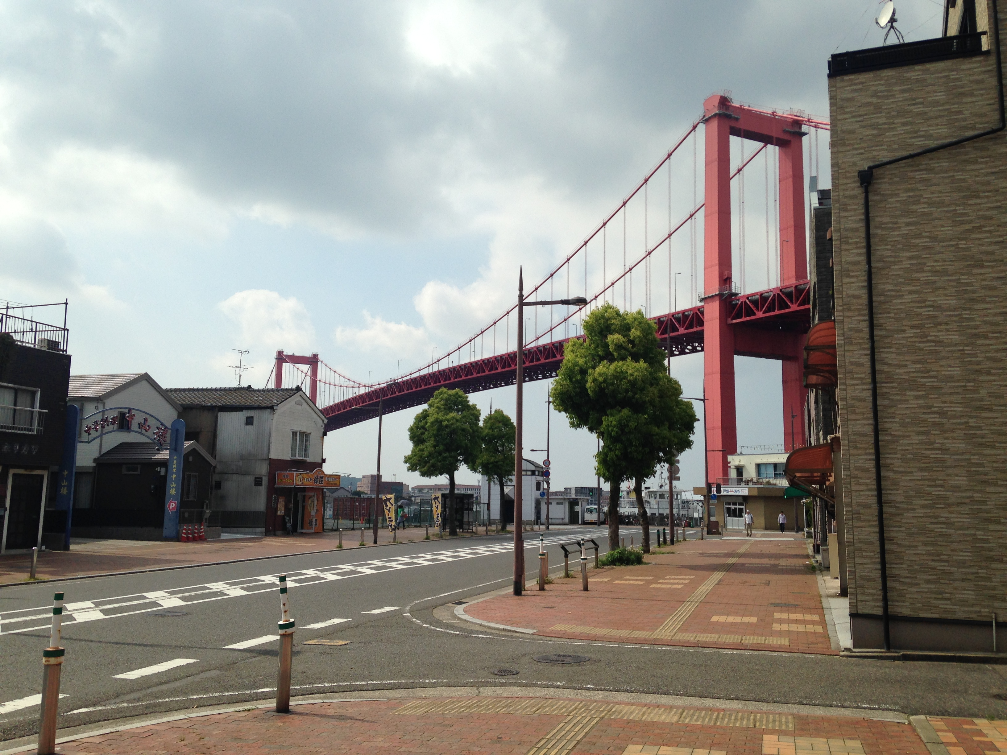 福岡県道38号より望む若戸大橋と若戸渡船の戸畑渡場